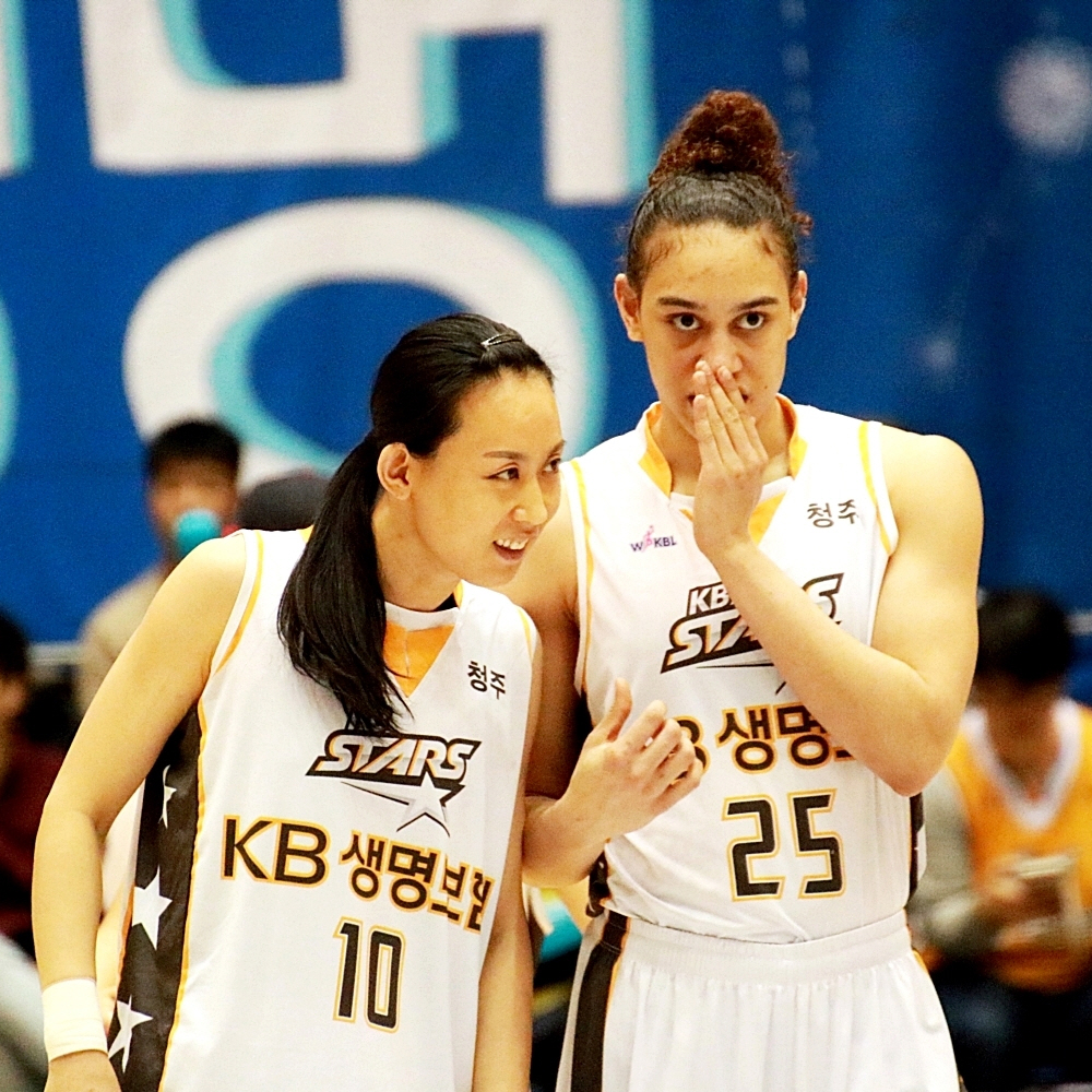 160220 여자농구 KDB생명 vs KB스타즈 직찍